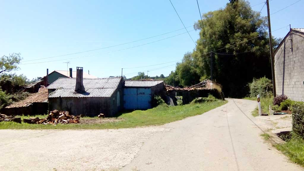 Vista da Cabana, Curtis.